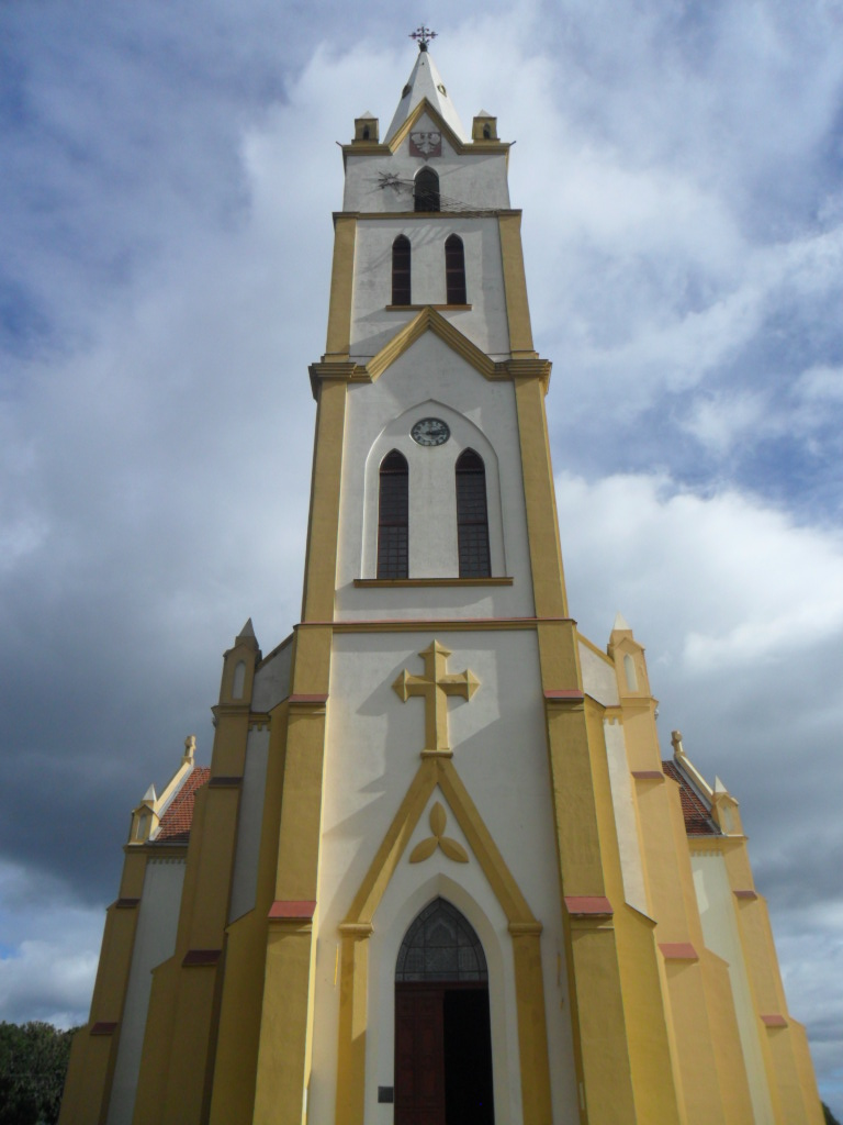 Igreja de Santa Estanislau, Itaiópolis, Santa Catarina